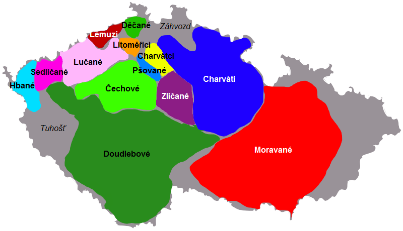 Mapka českých kmenů Čechové Doudlebové Děčané Lučané Sedličané Litoměřici Lemuzi Hbané Pšované Charváti Charvátci Zličané Moravané